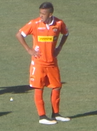 Jugador Sebastián Romero jugando por Cobreloa en el año 2015